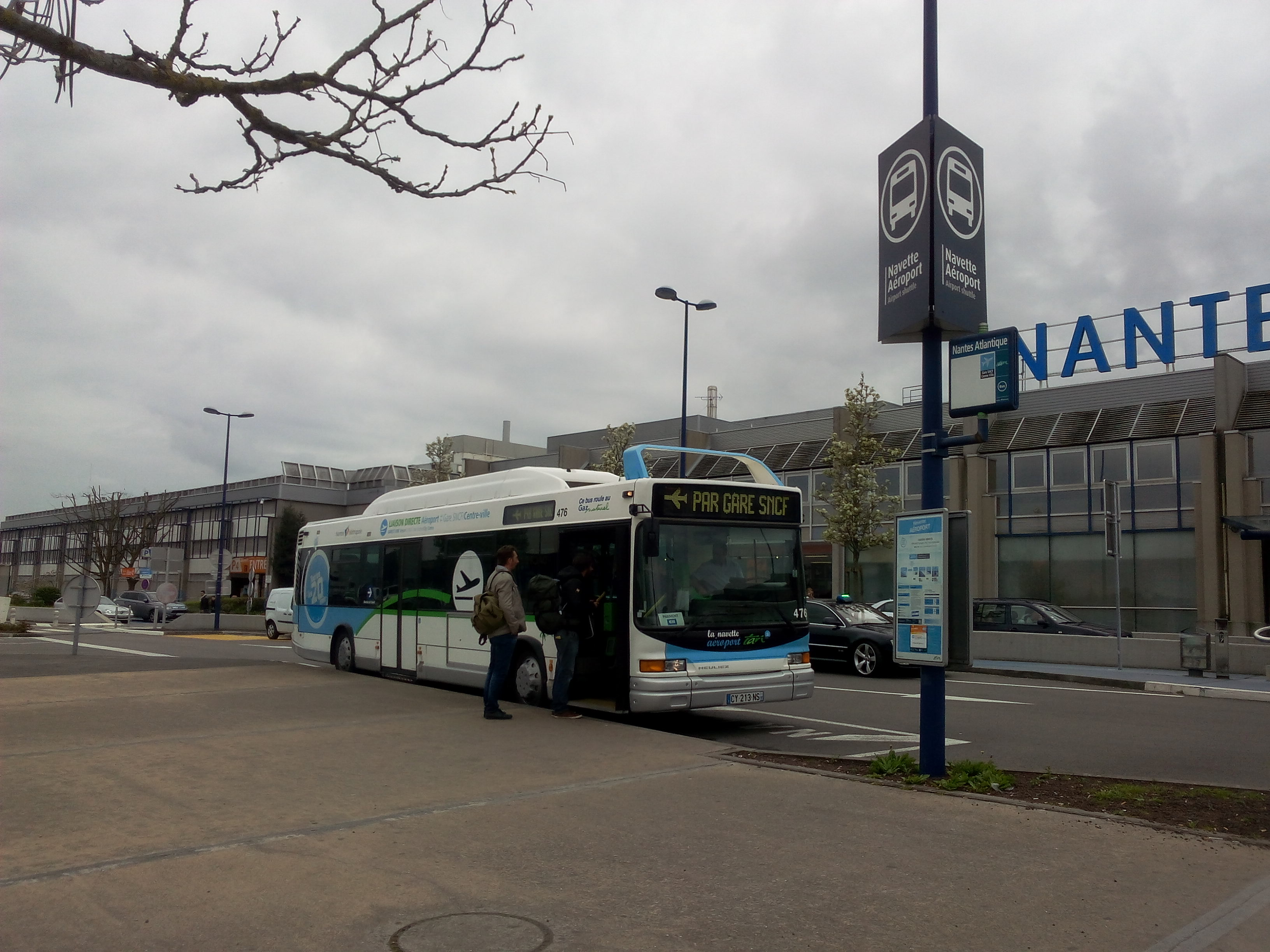 Navette Aéroport TAN assurée par un GX 317 à l'aéroport de Nantes Atlantique